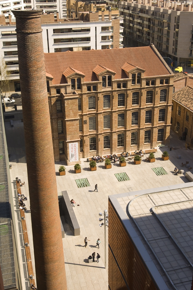 Campus del Poblenou, Universitat Pompeu Fabra - Barcelona